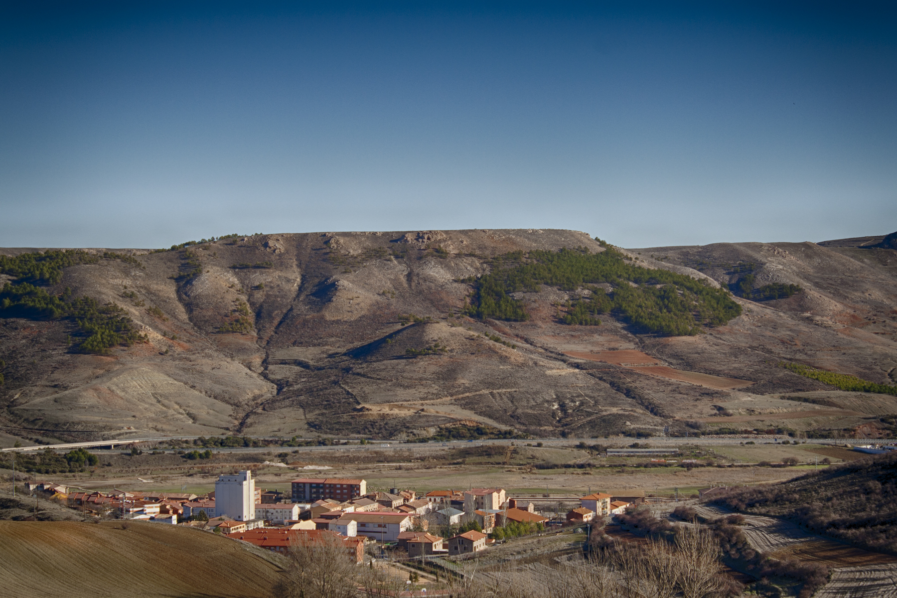 Barrio de la Estación Medinaceli Provincia de Soria Castilla y León España